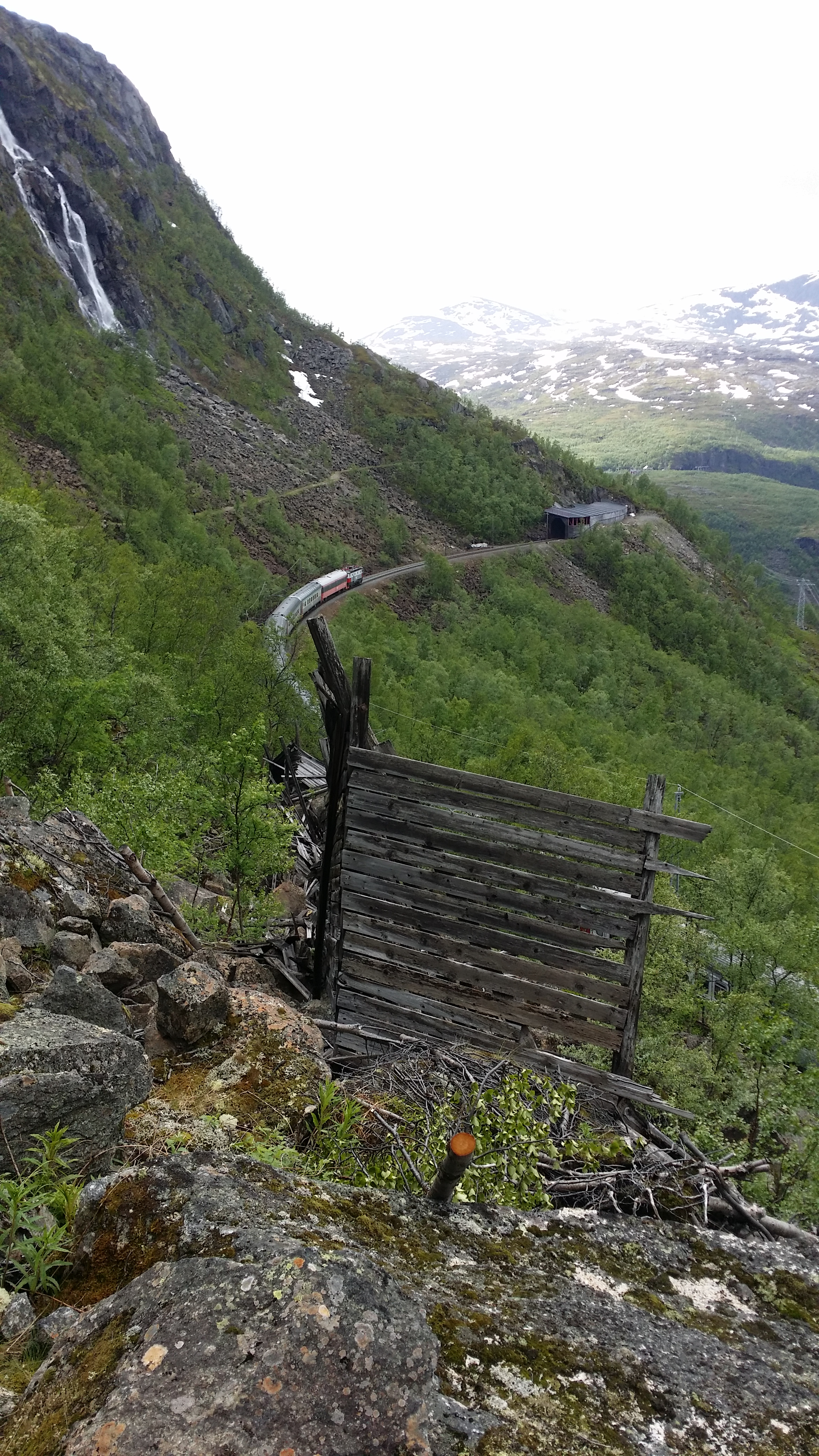 Den mest spektaktulære delen av Rallarveien er i Norddalen der den går i en bratt skrent ovenfor Ofotbanen.